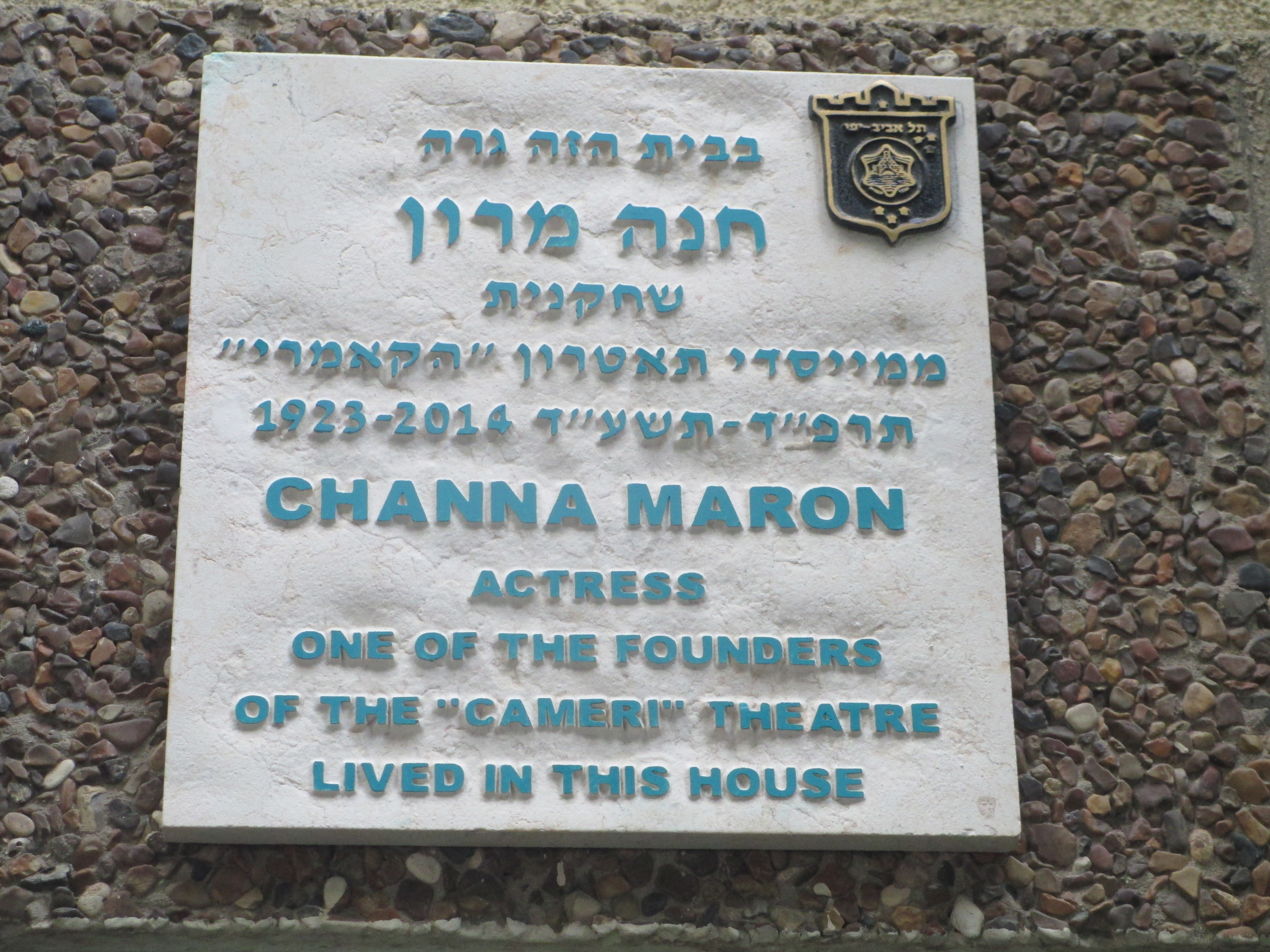 לוחית זיכרון בכניסה לביתה של חנה מרון בשדרות תרס"ט 3 בתל אביב